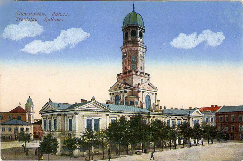 Будівництво четвертої ратуші в Станіславові (нині Івано-Франківськ).